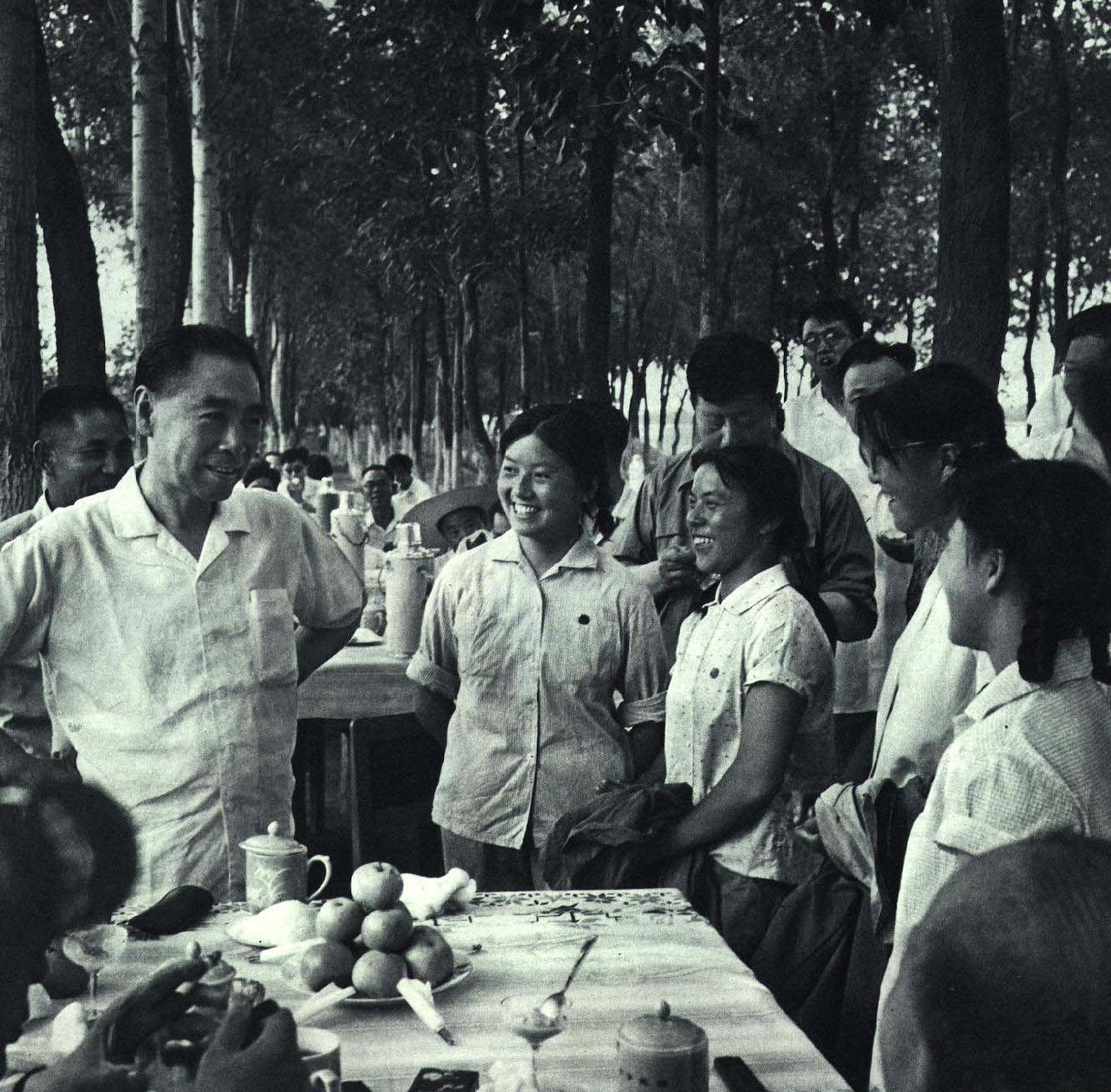 1965-10 1965年 周恩来视察新疆石河子农场与上海知青